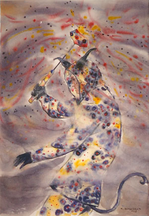 Quadre de Joaquim Budesca dedicat als Diables de Vilanova i la Geltrú